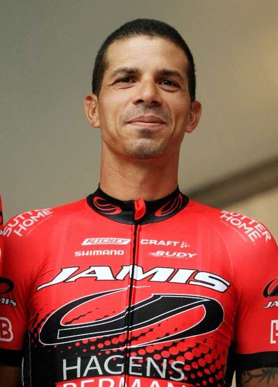 Luis Romero Amaran en la presentación del USA Pro Cycling Challenge 2013